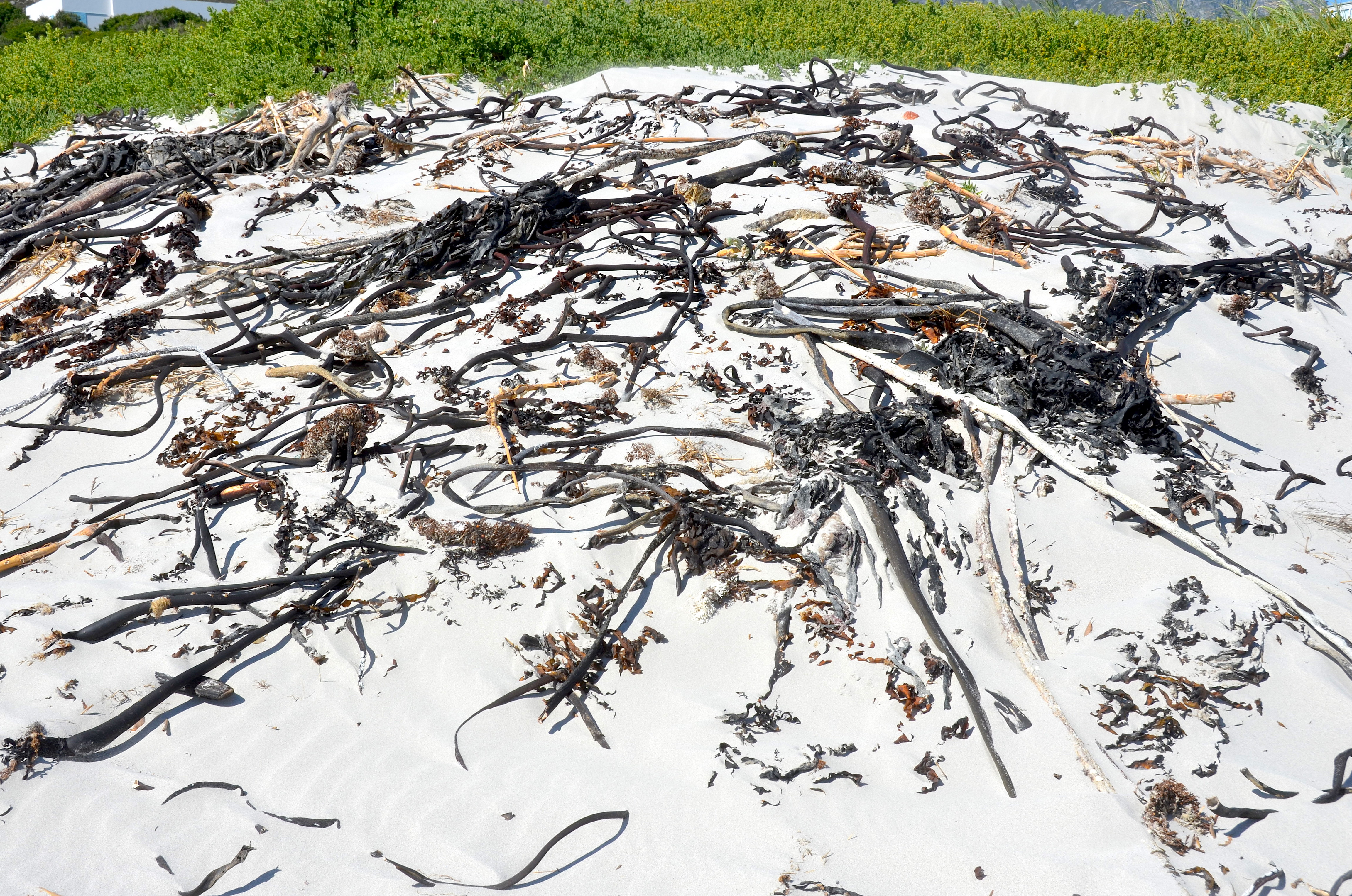 Seetang auf einer Düne an Grotto Beach in Südafrika